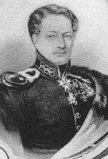 Kommandeur Ulanen-Regiment "Großherzog Friedrich von Baden" (Rheinisches) Nr. 7